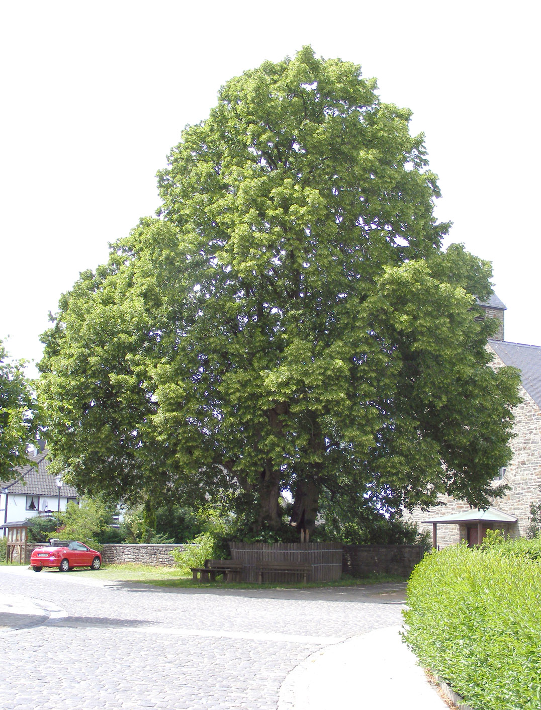 Dorflinde im „Golddorf“ Eicherscheid (Simmerath, Eifel)